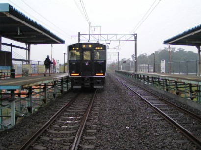 2005/03/27に投稿者が東諌早駅にて撮影